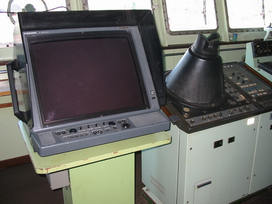 САРП на мостике тх Myroessa (бывш. Петр Васев) 18 июня 2003 года